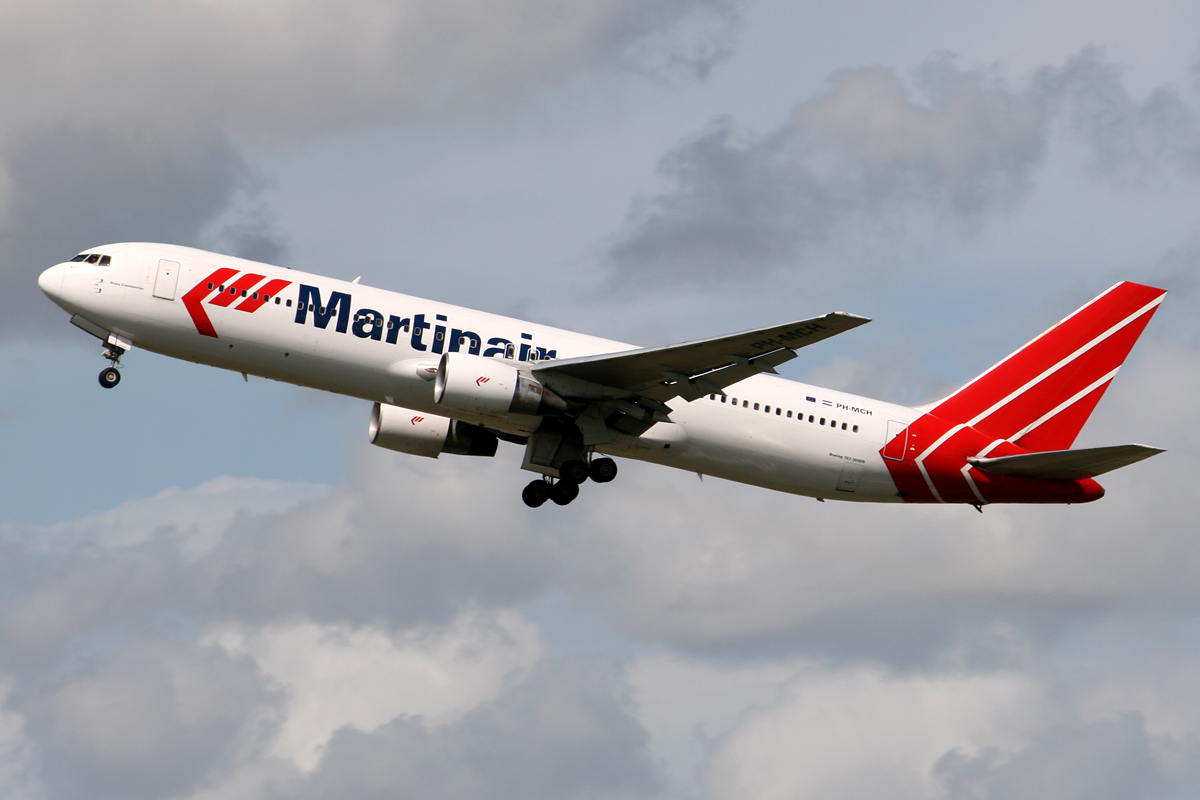 Martinair Boeing 767-300ER PH-MCH Amsterdam Schiphol AMS/EHAM